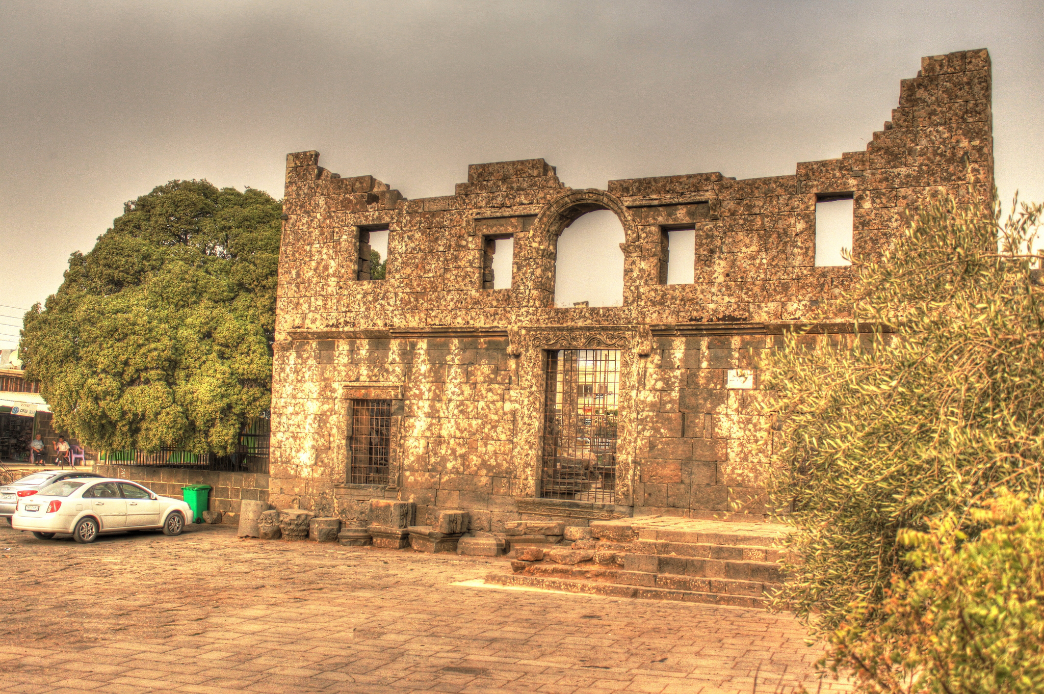 أثار مدينة قنوات - السويداء - سورية